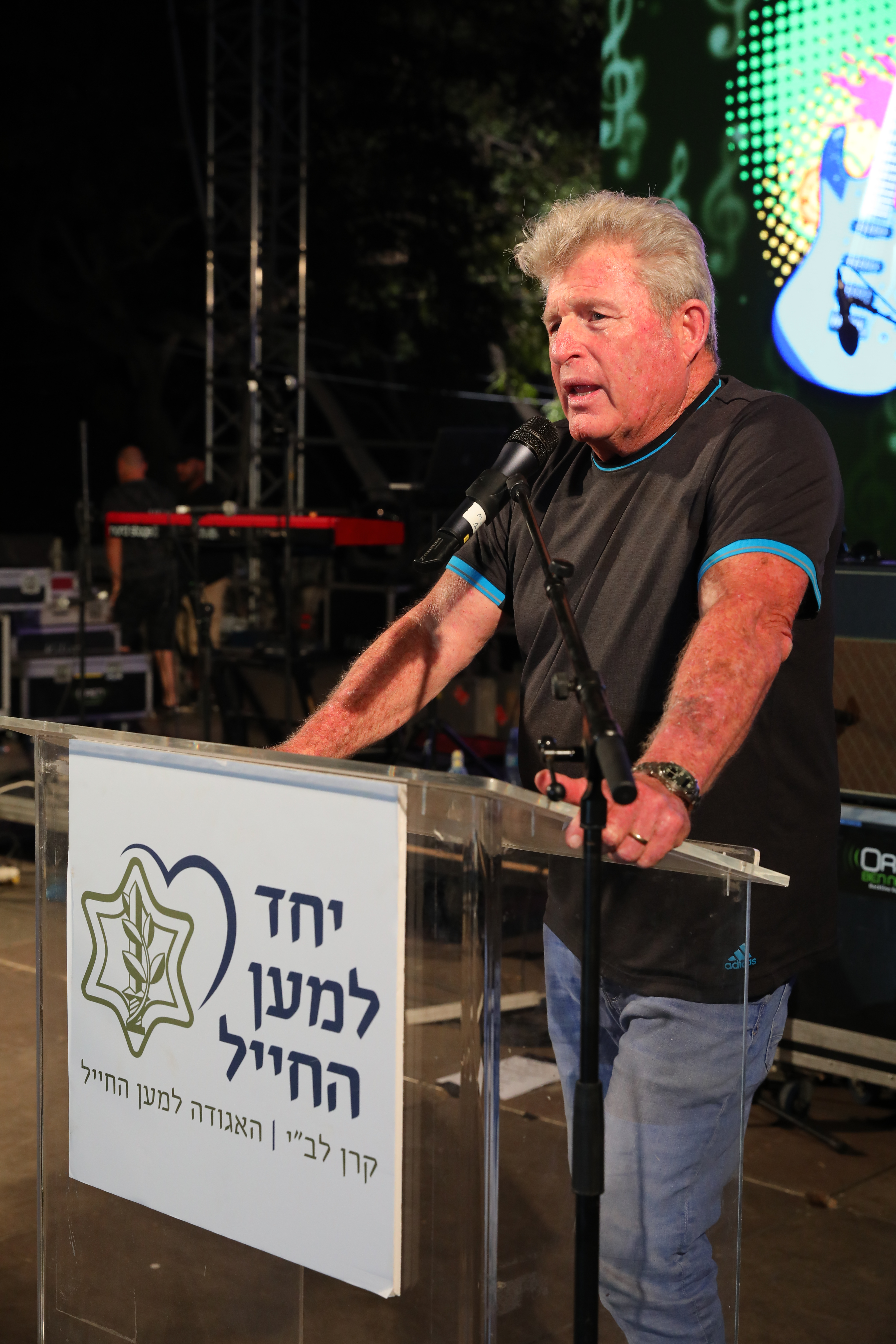 יור יחד למען החייל יורם ייה יאיר